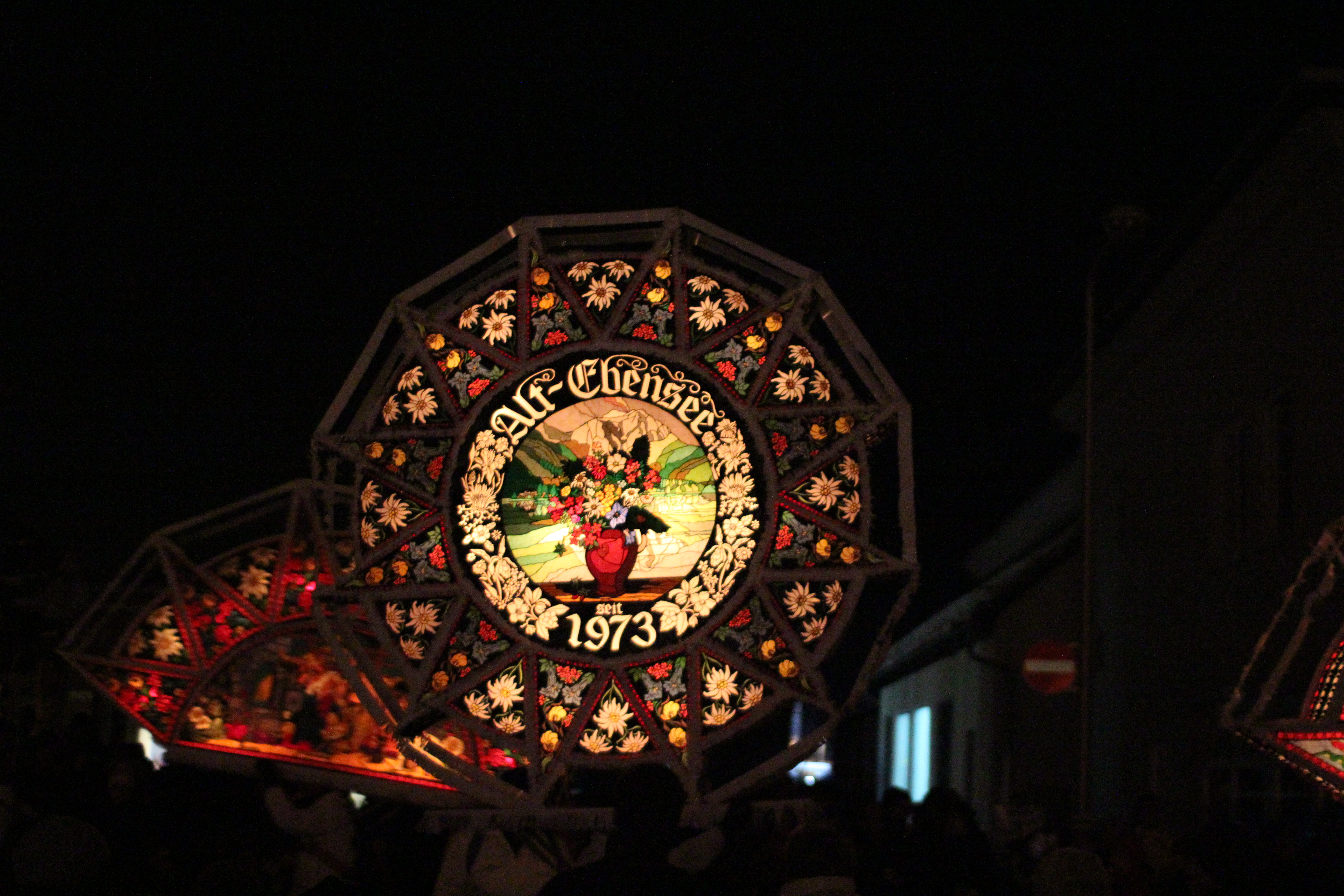 Glöckler aus Ebensee